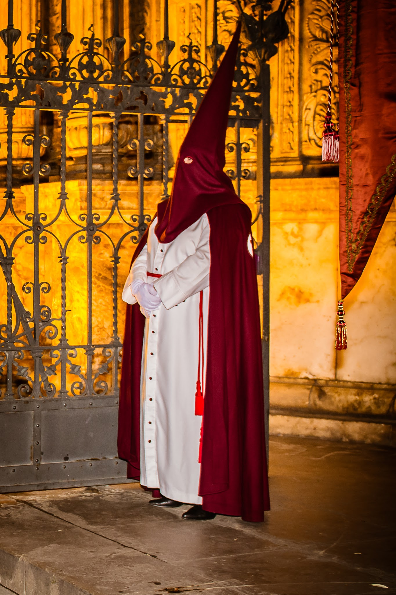 HABITO COMPLETO